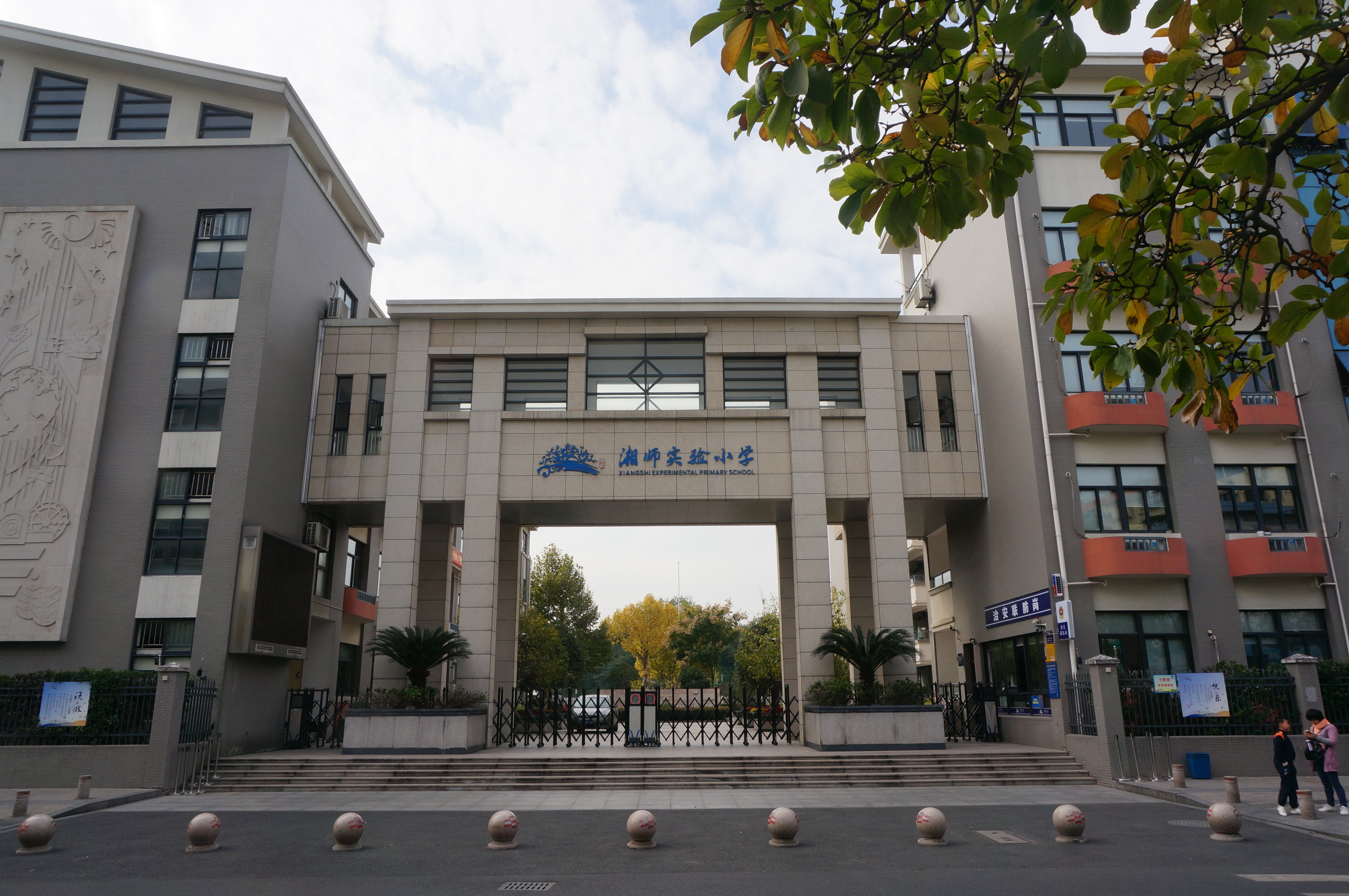 杭州萧山区湘师实验小学，东门。